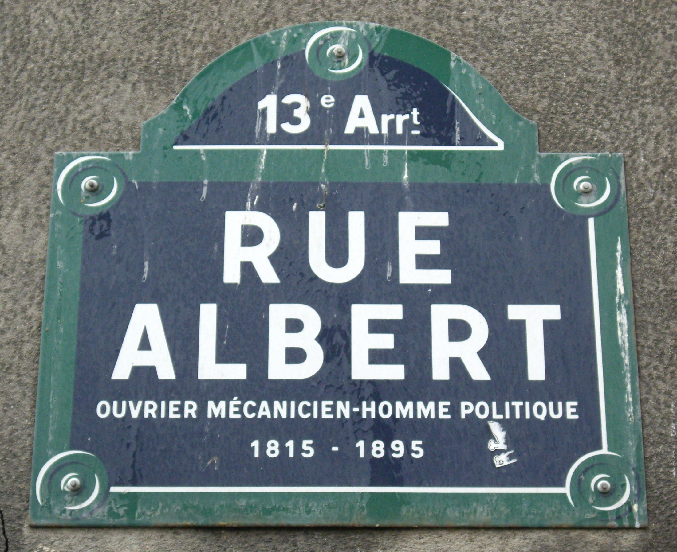 Plaque de la rue Albert, Paris 13e, en hommage à l'ouvrier mécanicien et homme politique Alexandre Martin Albert (1815-1895)